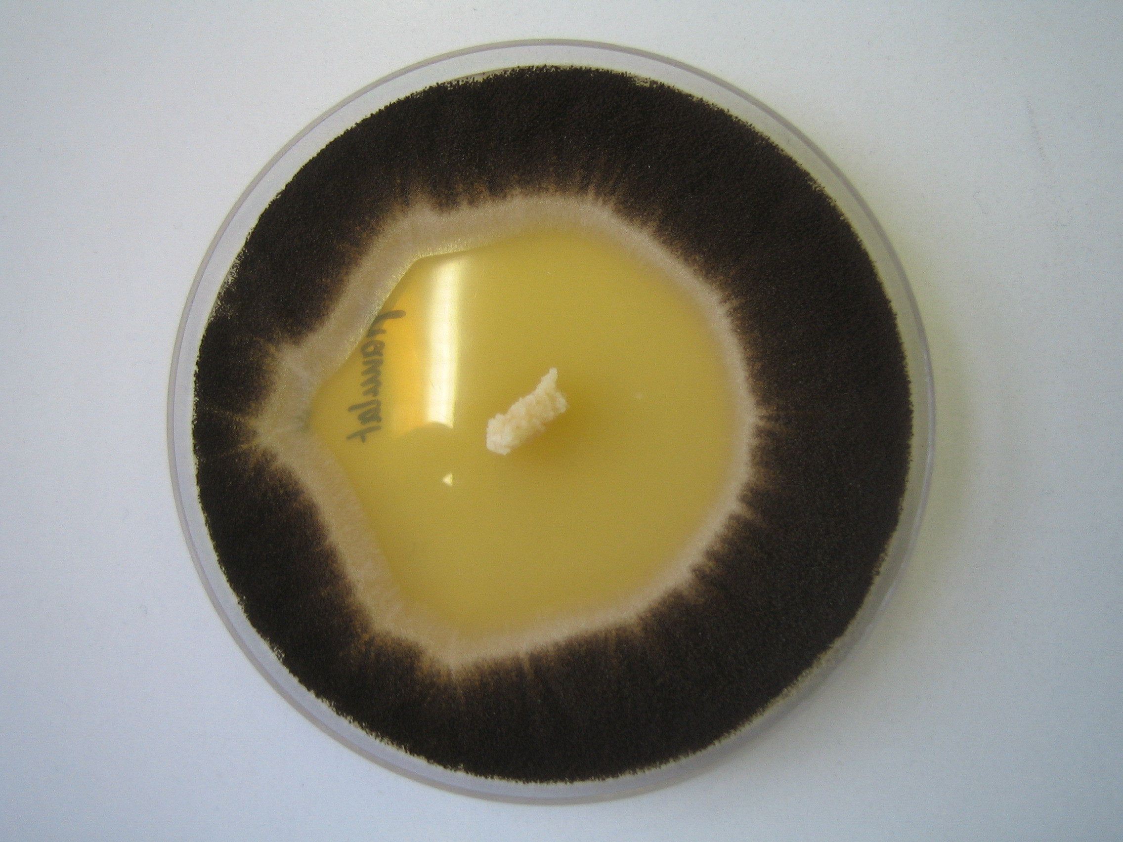 Aspergillus niger auf einem Malzagar mit Hemmhof um frisch gepressten Knoblauch.